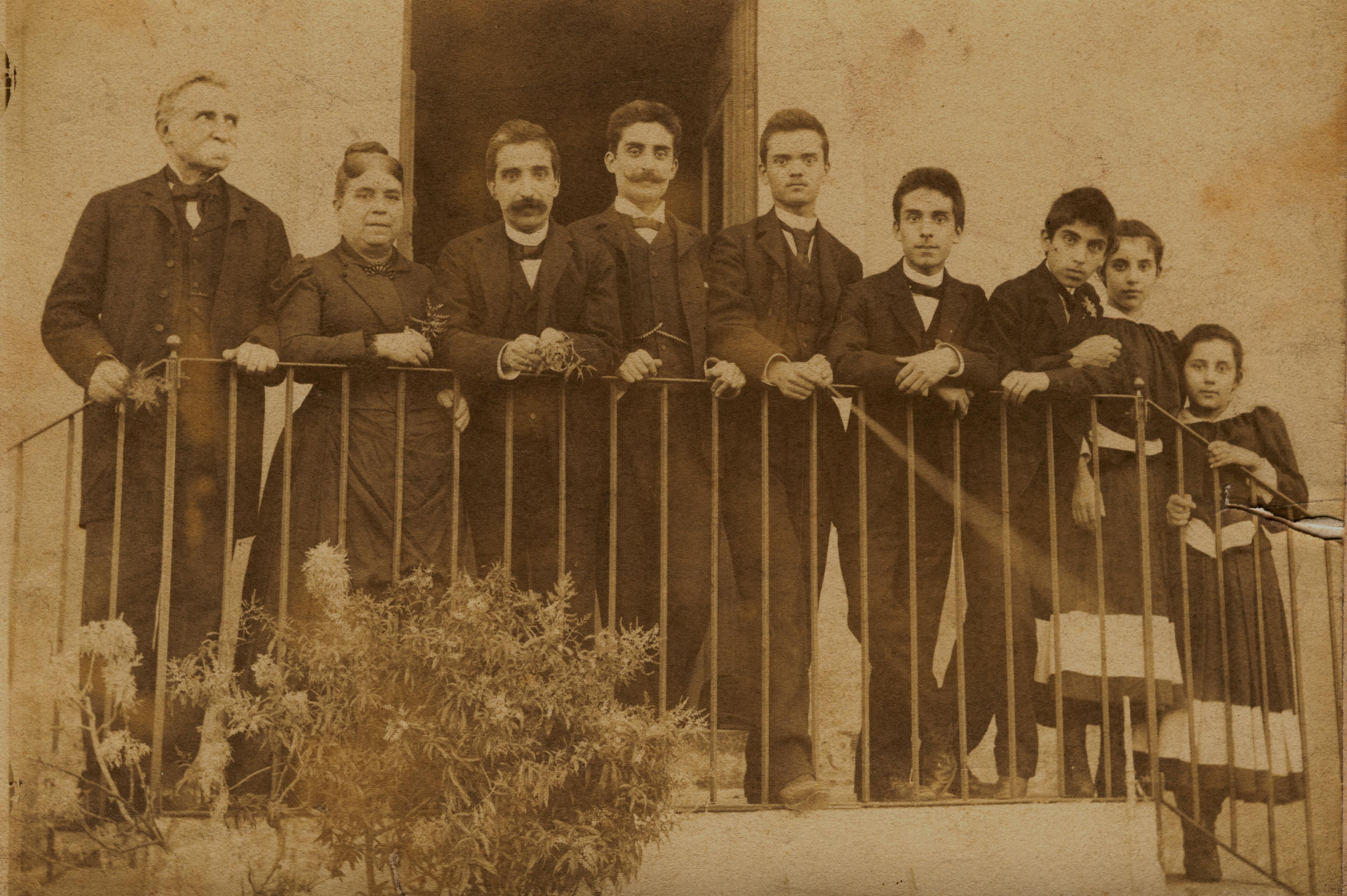 Ritratto della Famiglia Majorana Calatabiano di Militello in Val di Catania (anni '80 del XIX sec.)